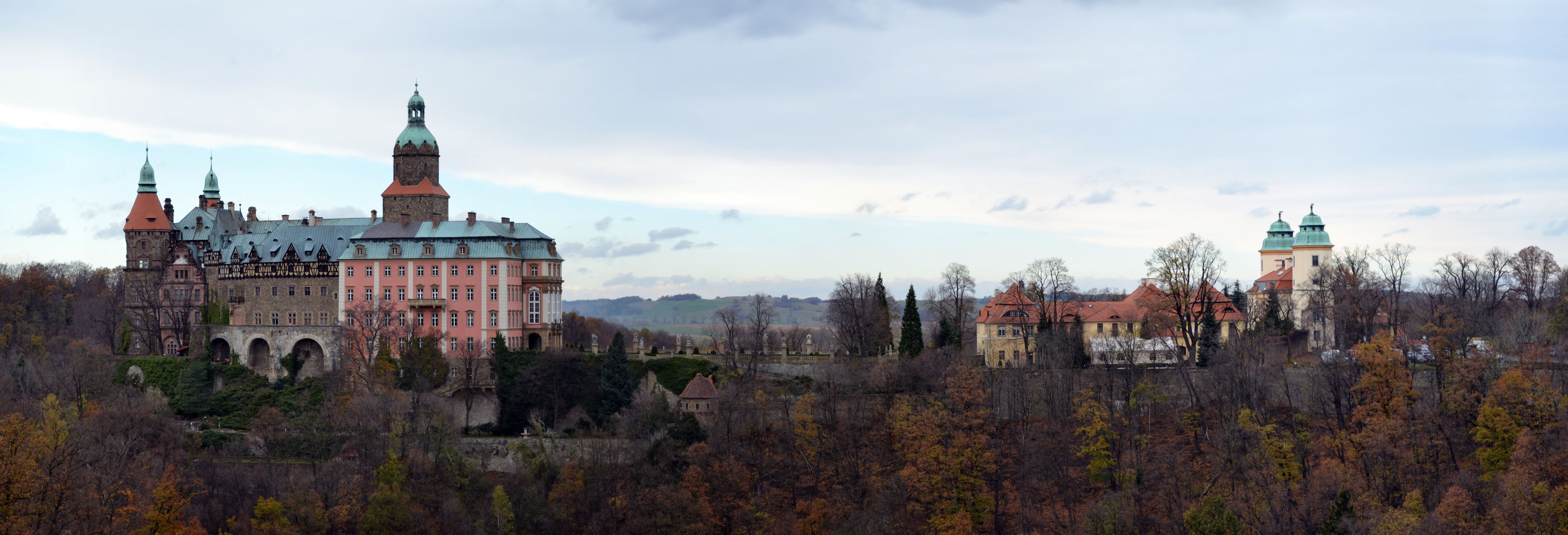 Wałbrzych, zespół rezydencjonalny Książ